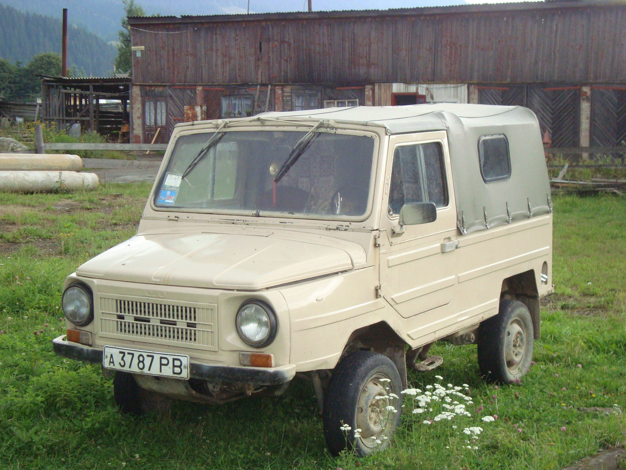 Луаз у Верховині Івано-Франківської області